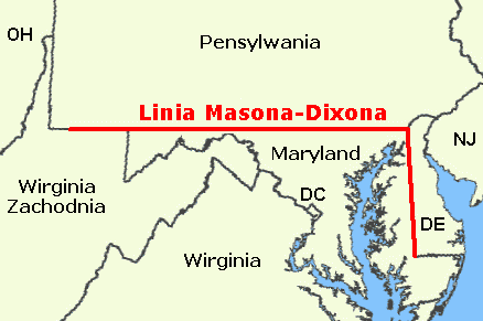 Linie Maxon-Dixon v USA - polské popisky